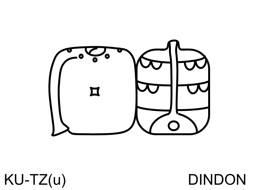 Glyphe maya KUTZ = Le dindon